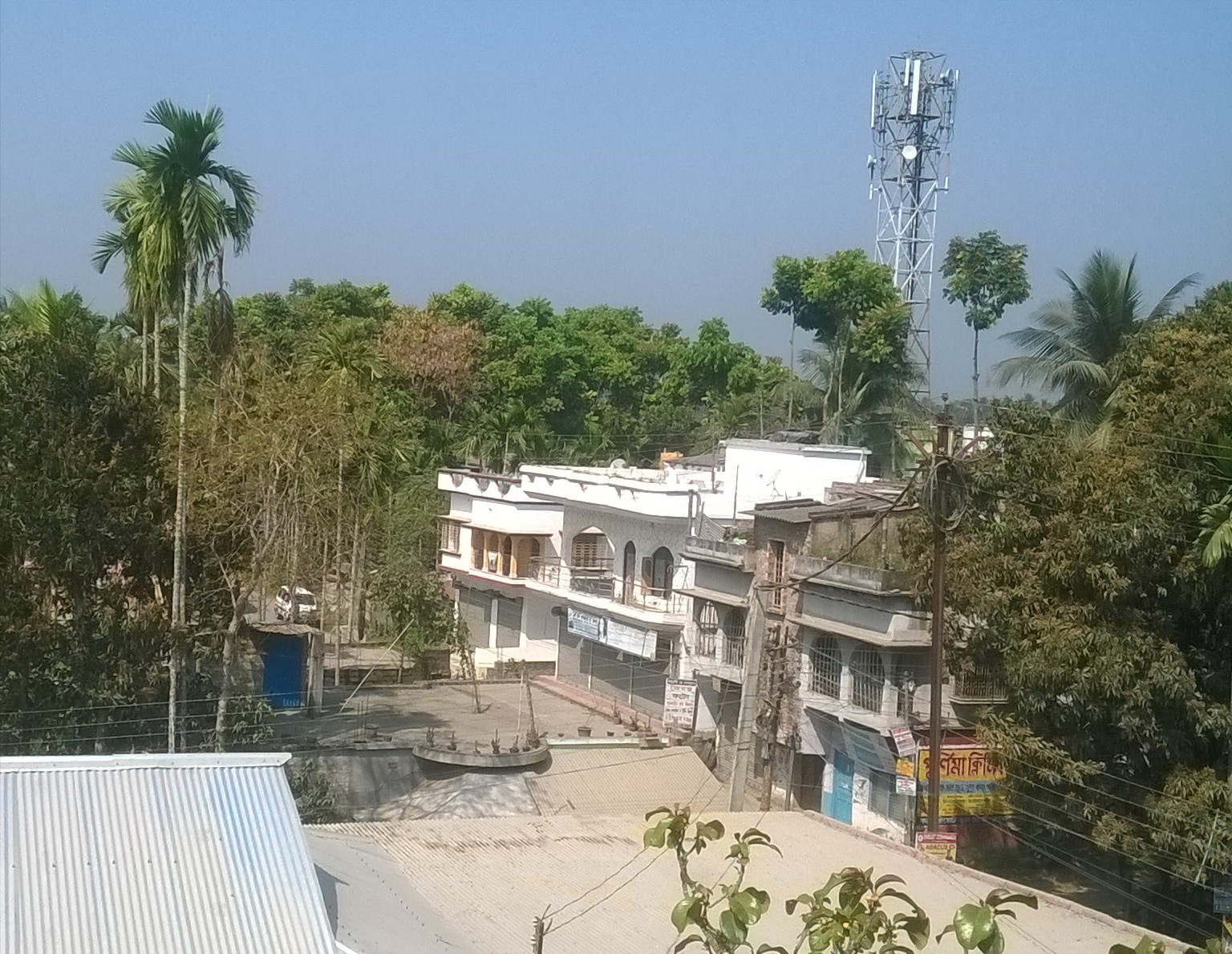 গোবরডাঙা শহরের একটি বসত এলাকা